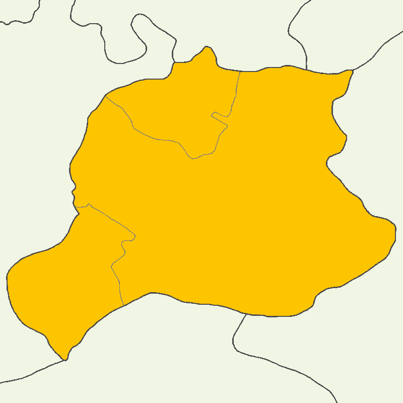 Bayburt'ta 2014 Türkiye cumhurbaşkanlığı seçimi sonuçları